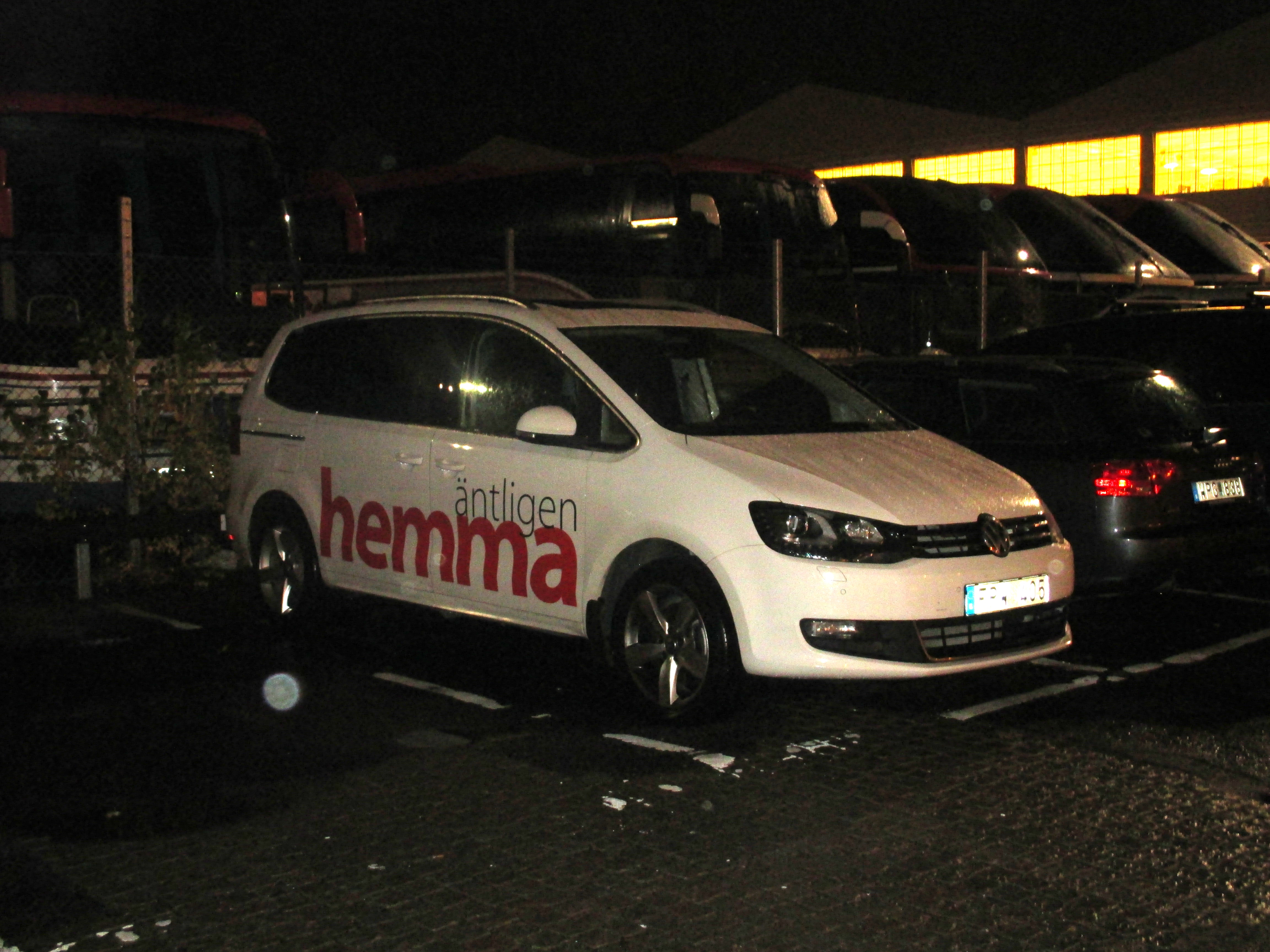 Bilen från Äntligen Hemma